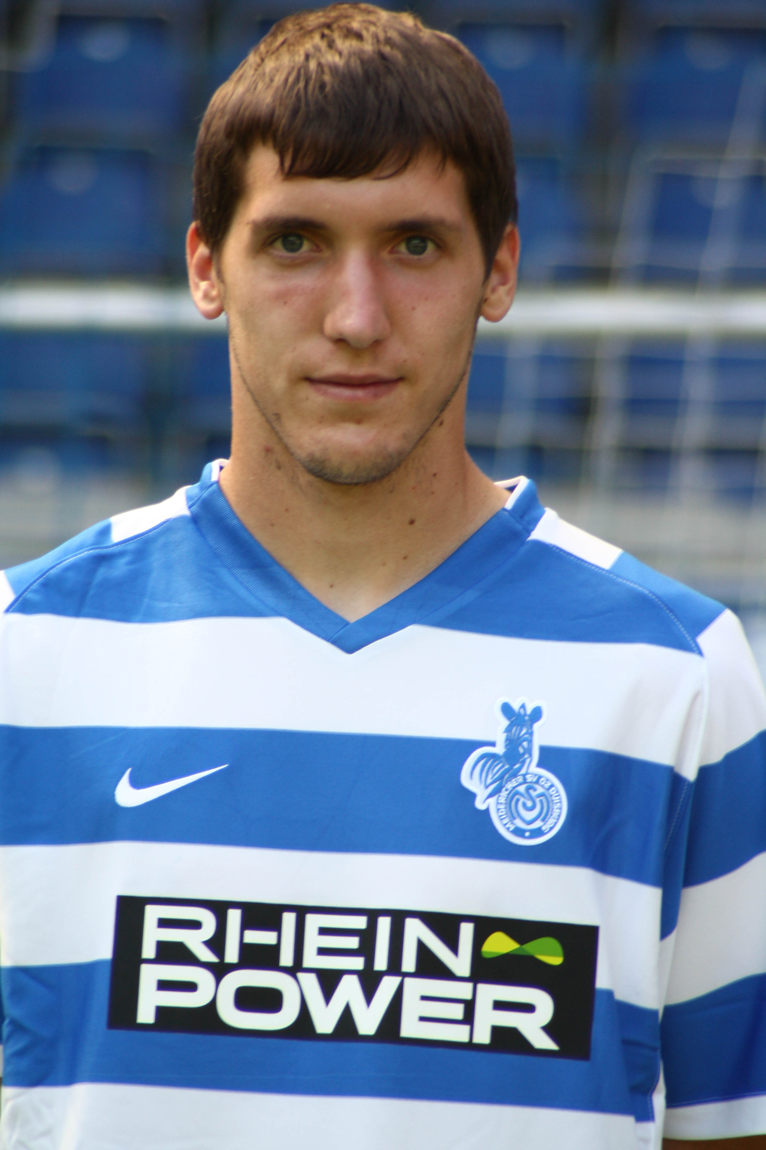 Zvonko Pamic, MSV Duisburg